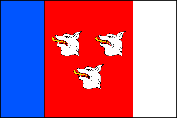 vlajka, Pavlovice u Přerova, okres Přerov